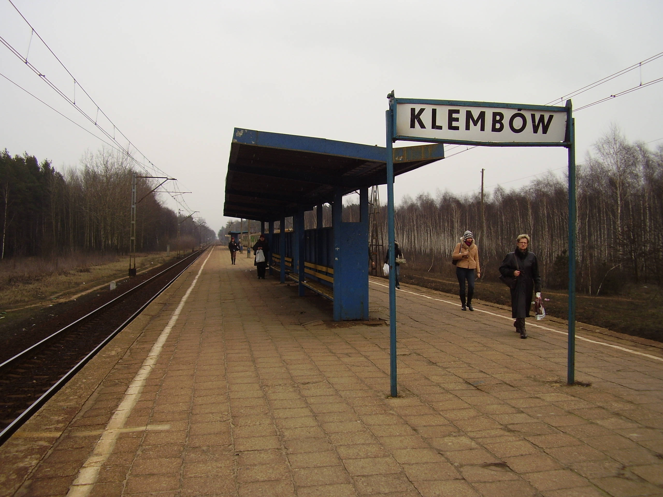 Przystanek kolejowy Klembów. Widok w stronę Małkinii.